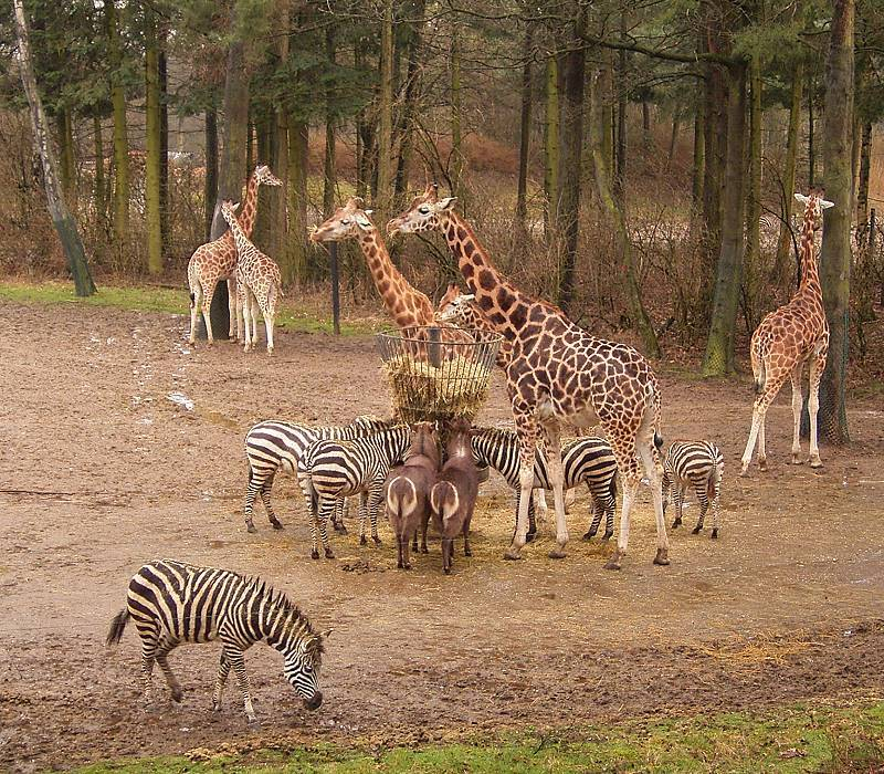 Burgers Zoo, NL